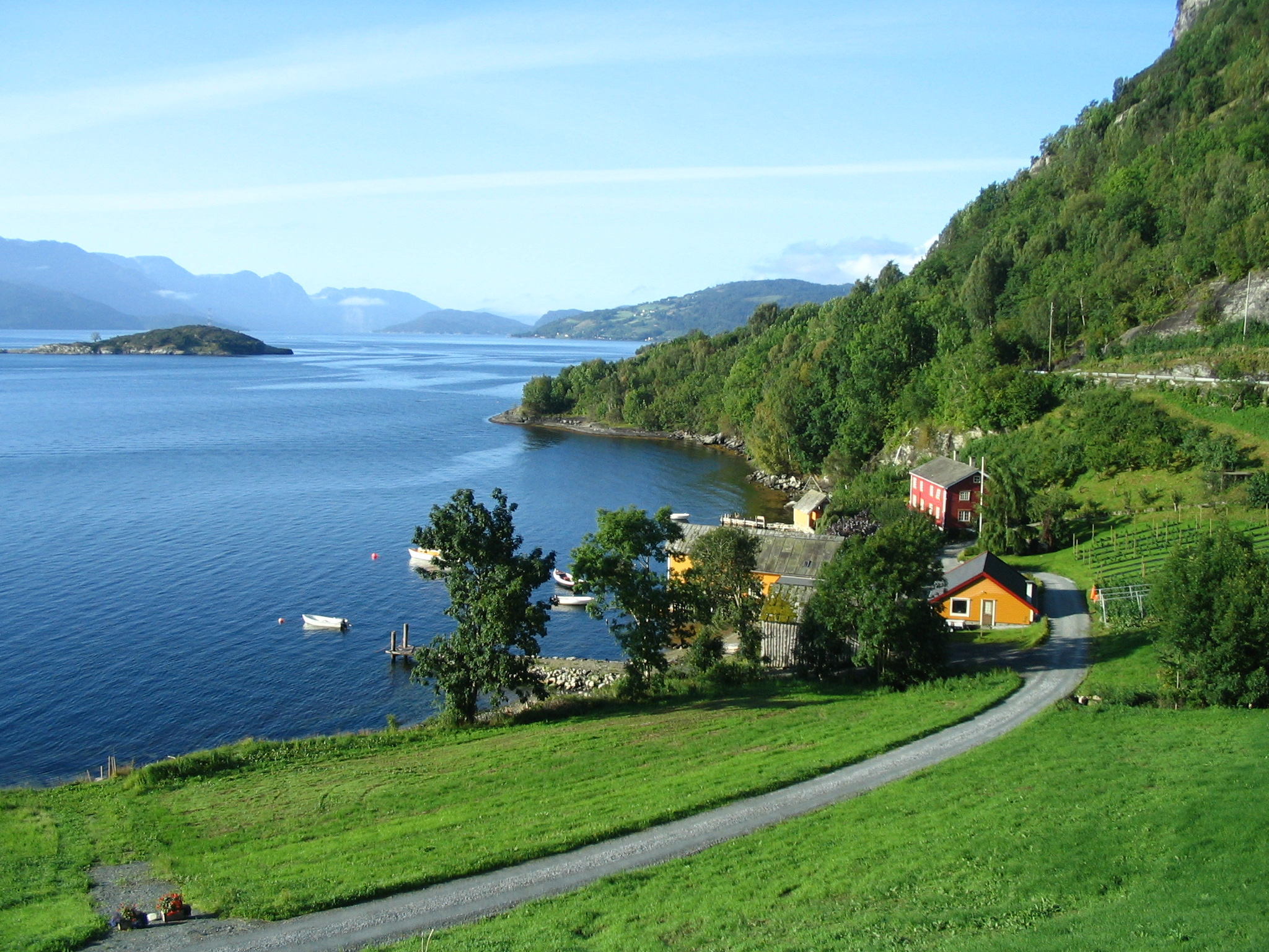 Rykkje i Kvam, Øykalven til venstre i bildet